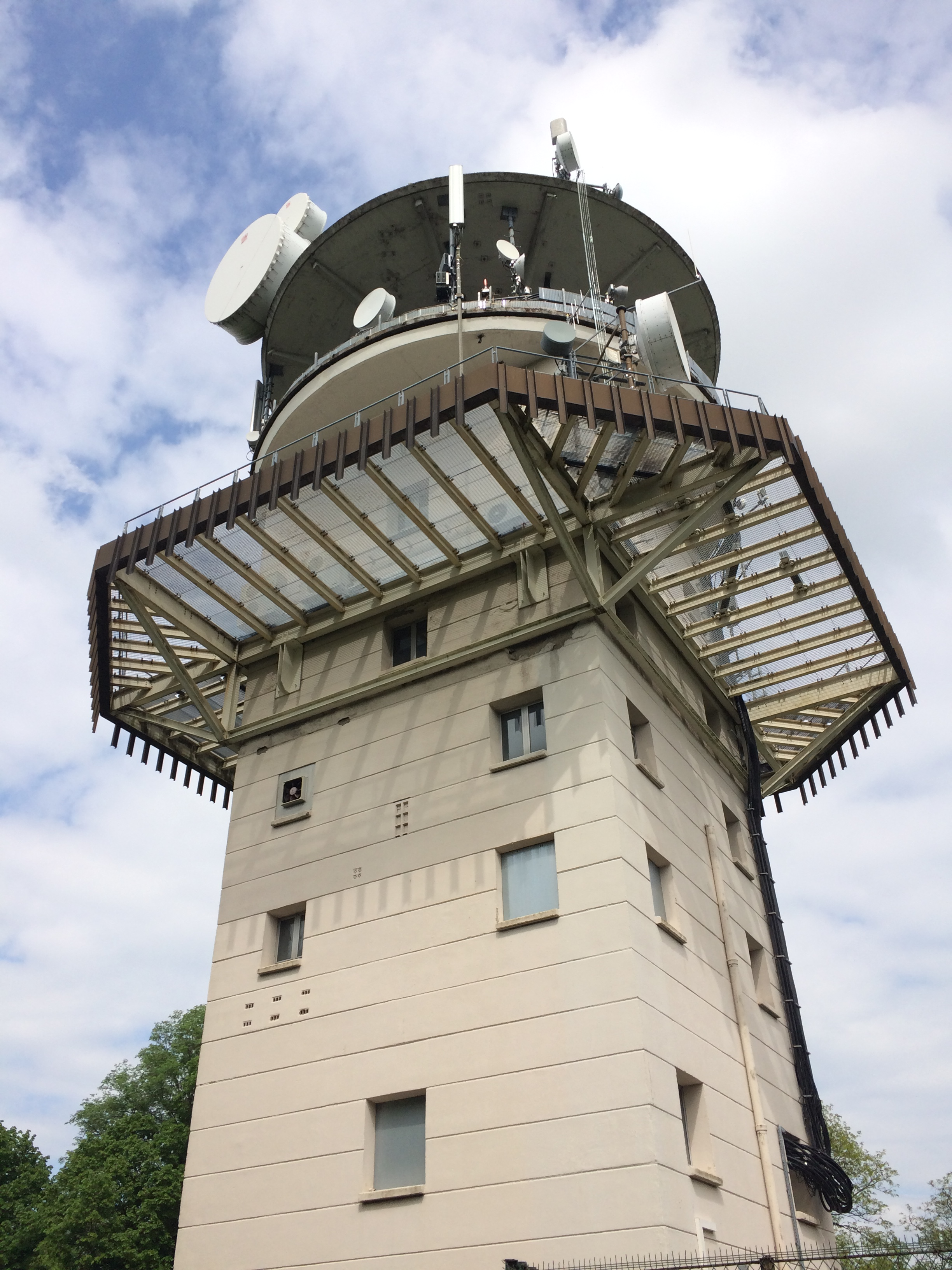 Tour TDF présente sur le Mont St-Quentin